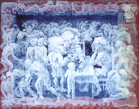 State- Վիճակ